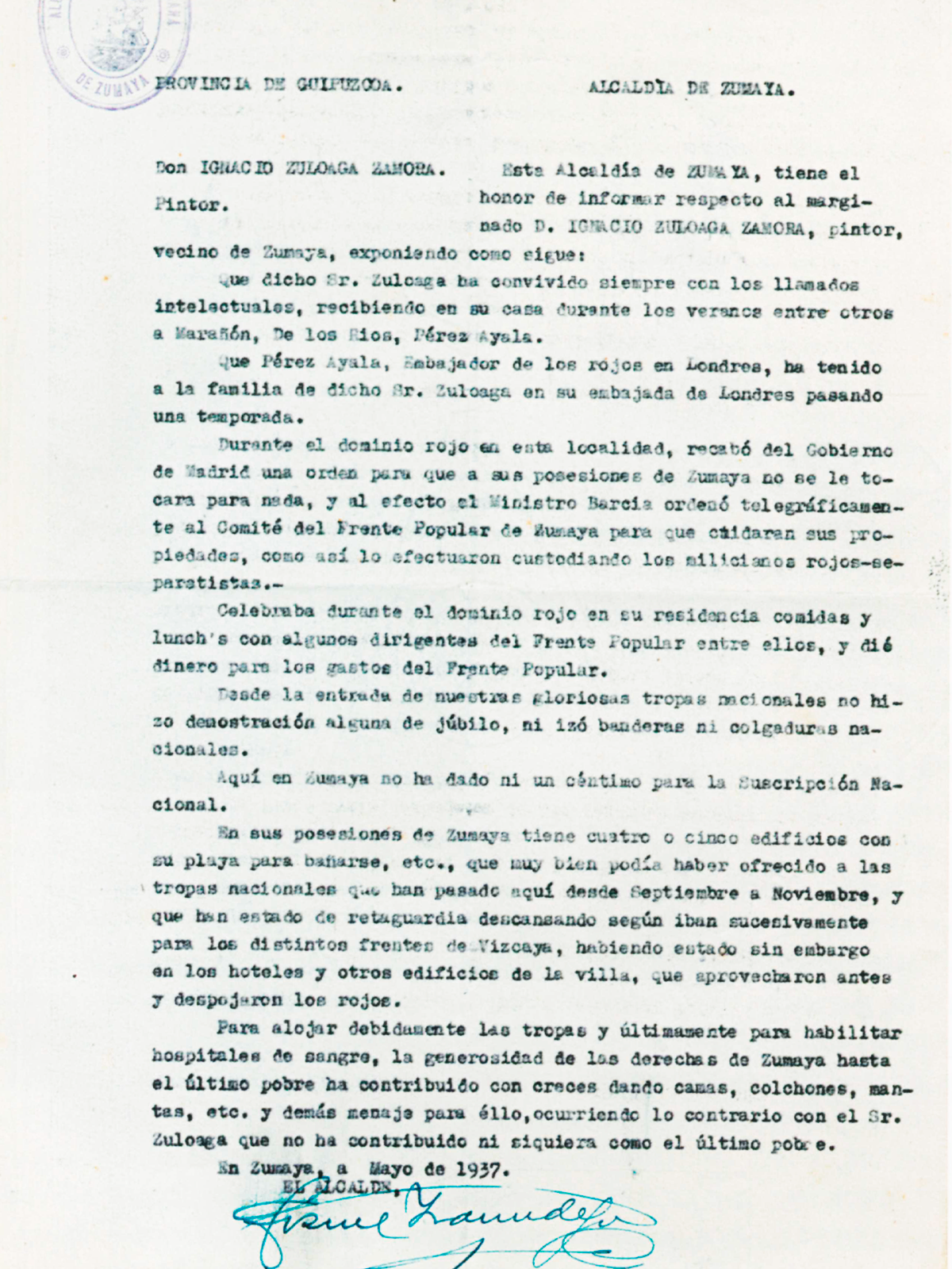 Informe sobre Ignacio Zuloaga por el alcalde franquista de Zumaia.